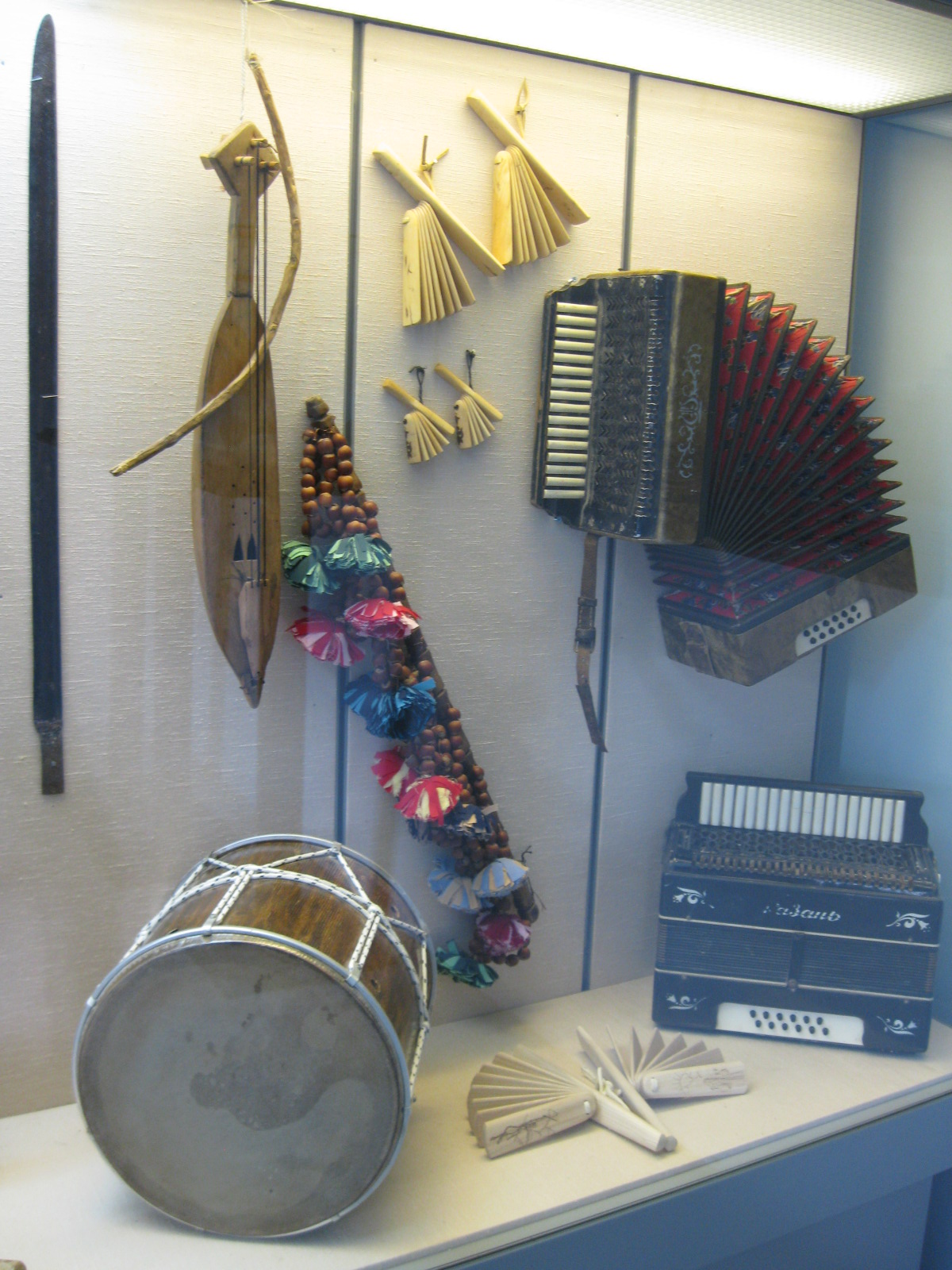 המרכז למורשת הצ'רקסית הוא מרכז מבקרים בכפר כמא שבגליל התחתון, הסוקר את ההיסטוריה של העם הצ'רקסי. במרכז קיים מוזיאון אשר מציג פריטים אותנטיים מהמורשת הצ'רקסית.